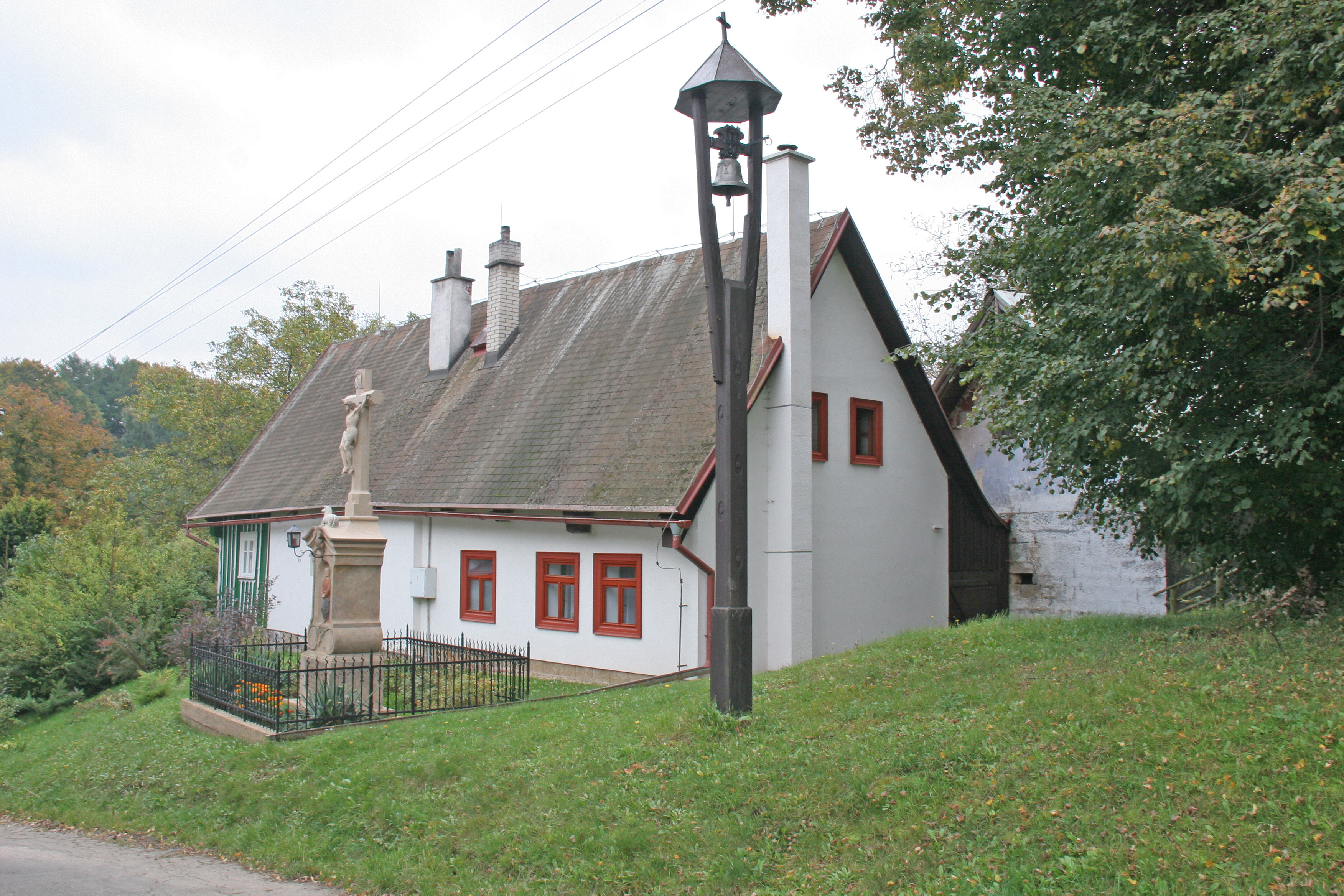 Bezník zvonička a kříž